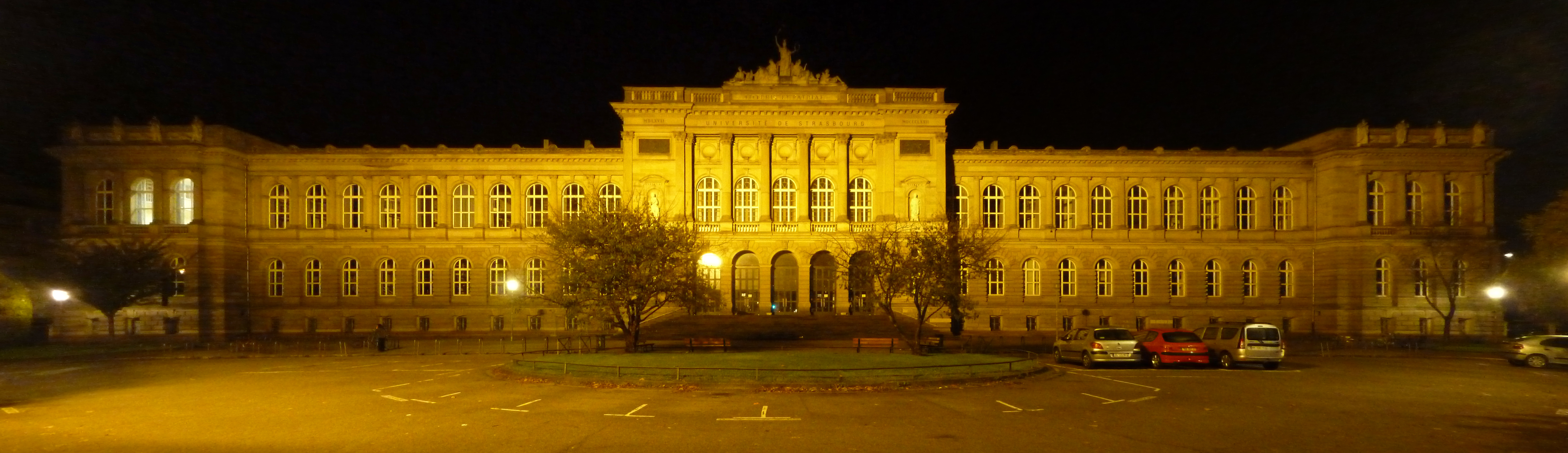 Palais universitaire de Strasbourg de nuit en octobre 2014.